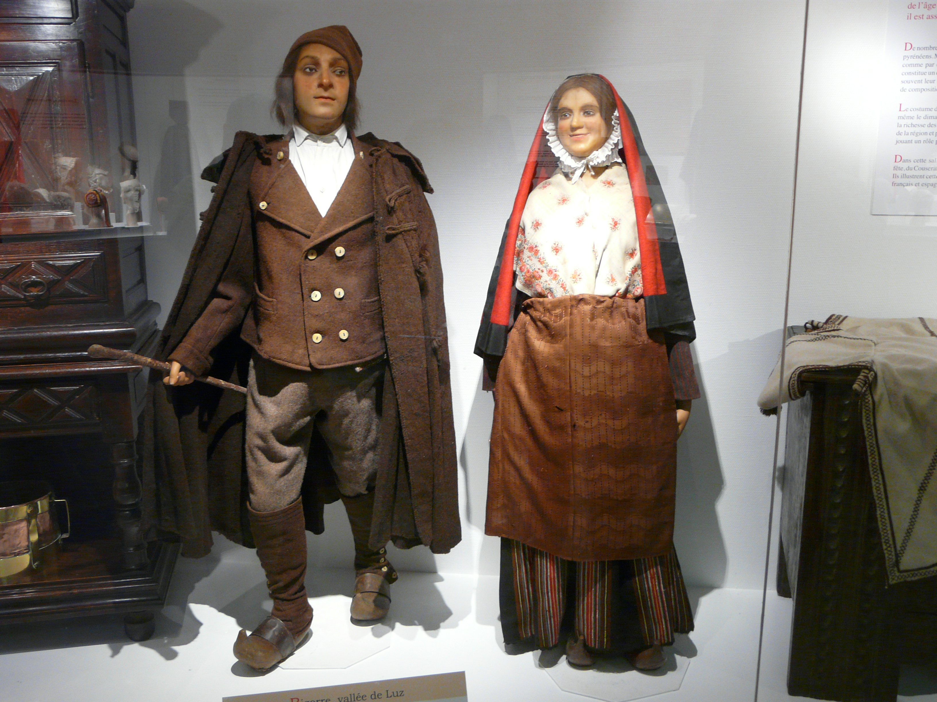 Costumes traditionnels bigourdans de la vallée de Luz ; musée pyrénéen, château fort de Lourdes, Hautes-Pyrénées, France.